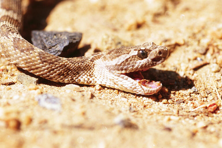 Crotalus viridis oreganus